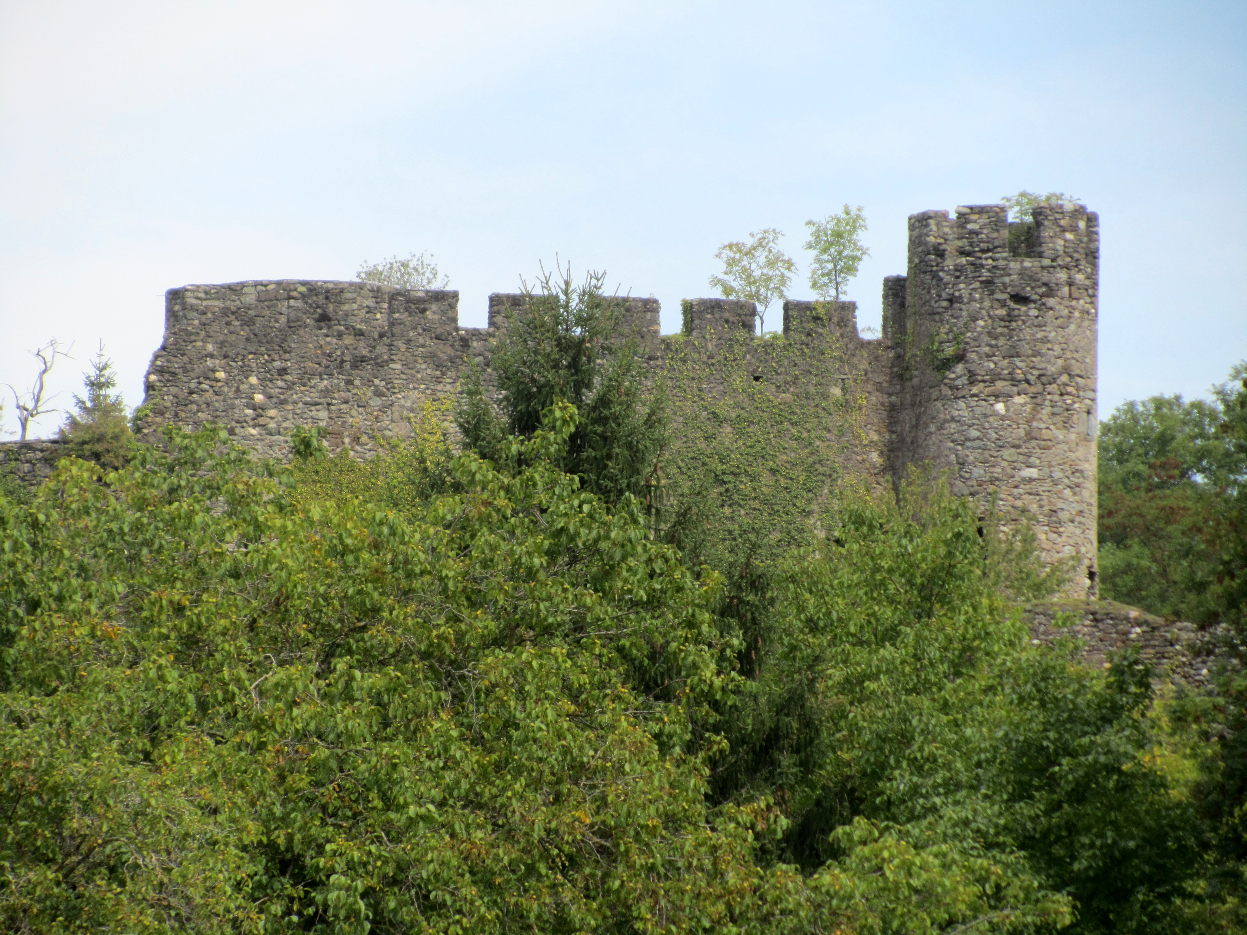 Château de la Rochette à Lully (Haute-Savoie)